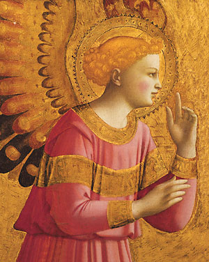 Annunciatory Angel (detail) [1] (exhibited at Musée du Louvre in Paris?)